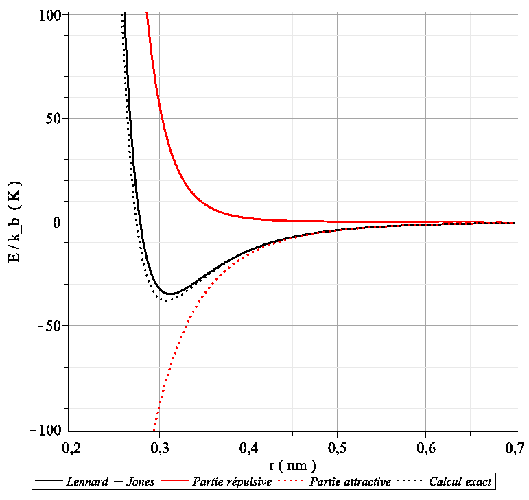 Potentiel interatomique neon-neon